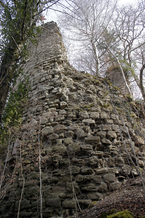 Les ruines de l'ancien Chaâteau de Madic, en Auvergne